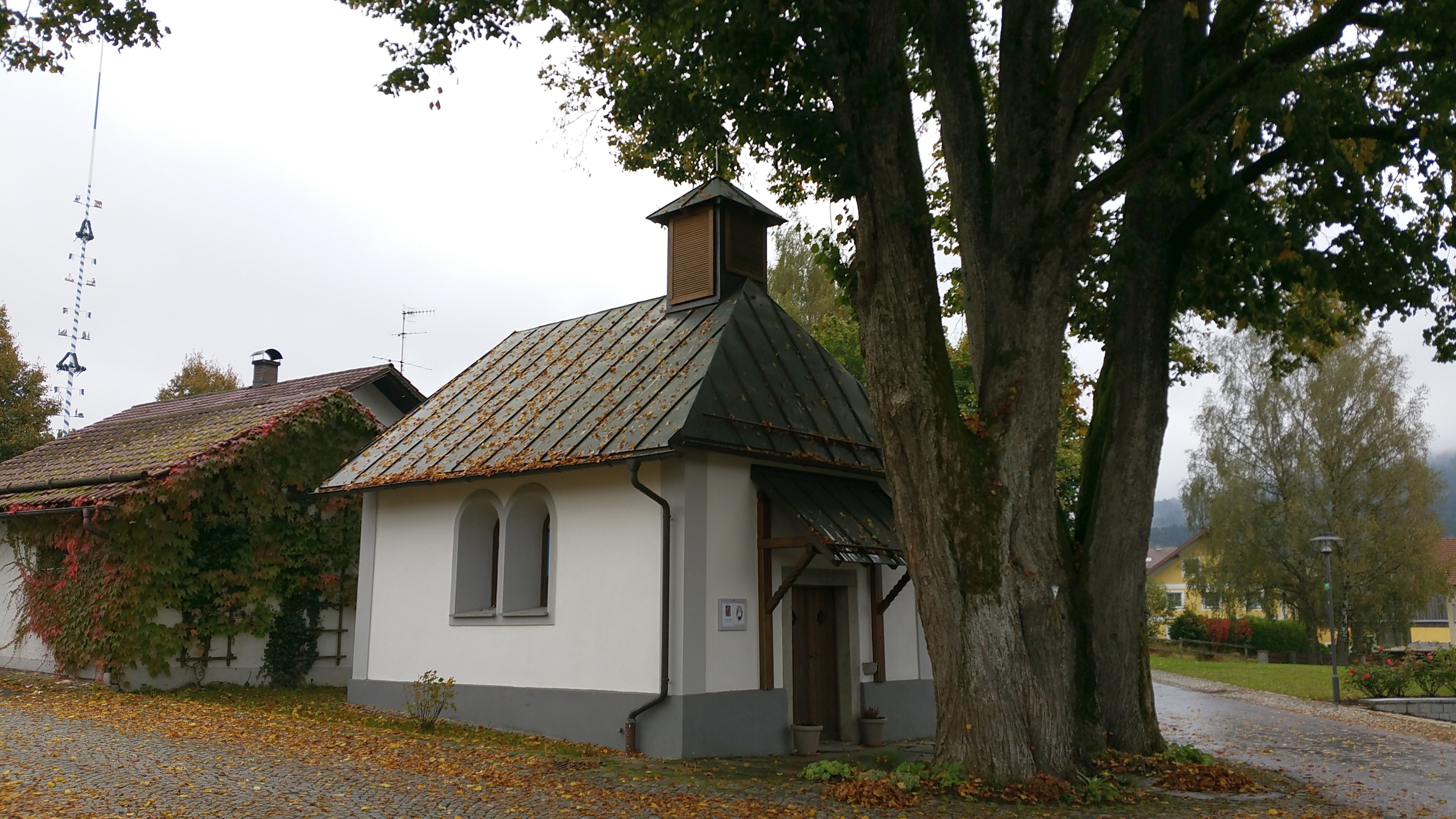 Ortskapelle Schönanger, Bäume vor der Tür Naturdenkmale